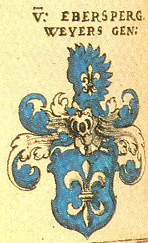 Ritterschaft und Adel in Franken von Ebersberg, genannt Weyers